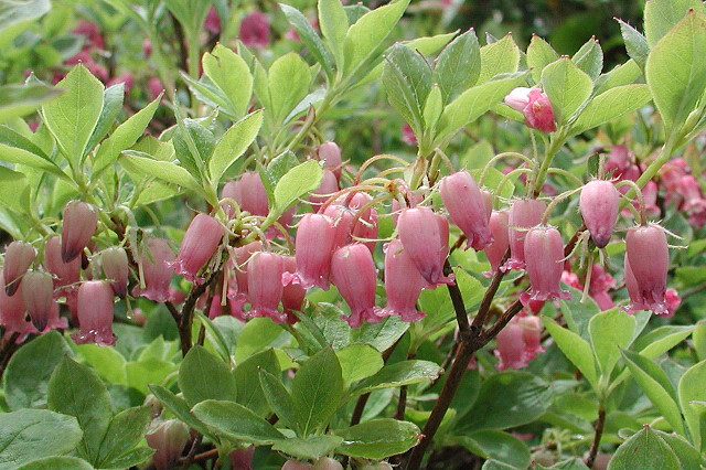 ガクウラジロヨウラク（山形県月山） Menziesia multiflora var. longicalyx (Mt. Gassan, Yamagata, JAPAN)